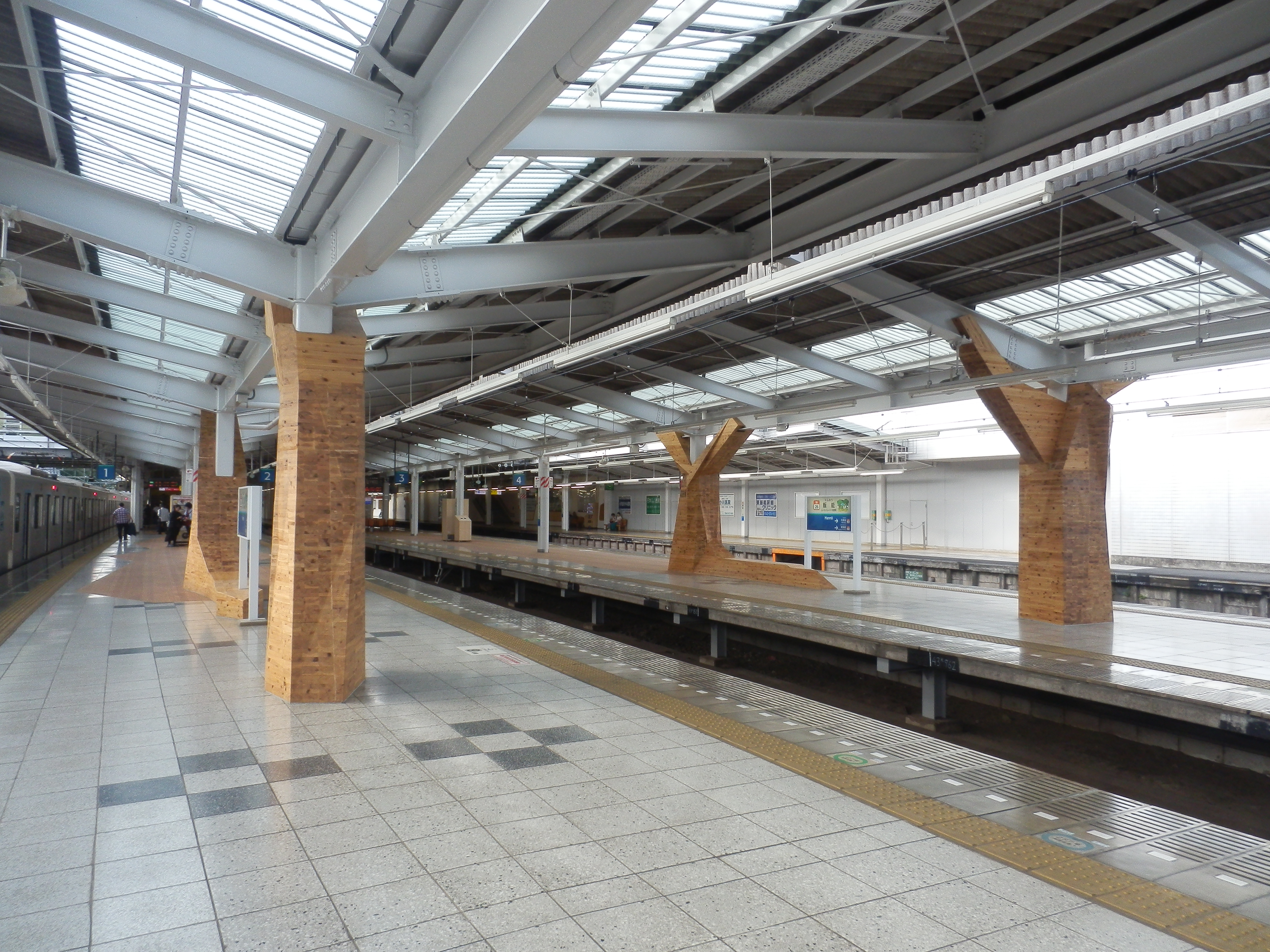 飯能駅ホーム